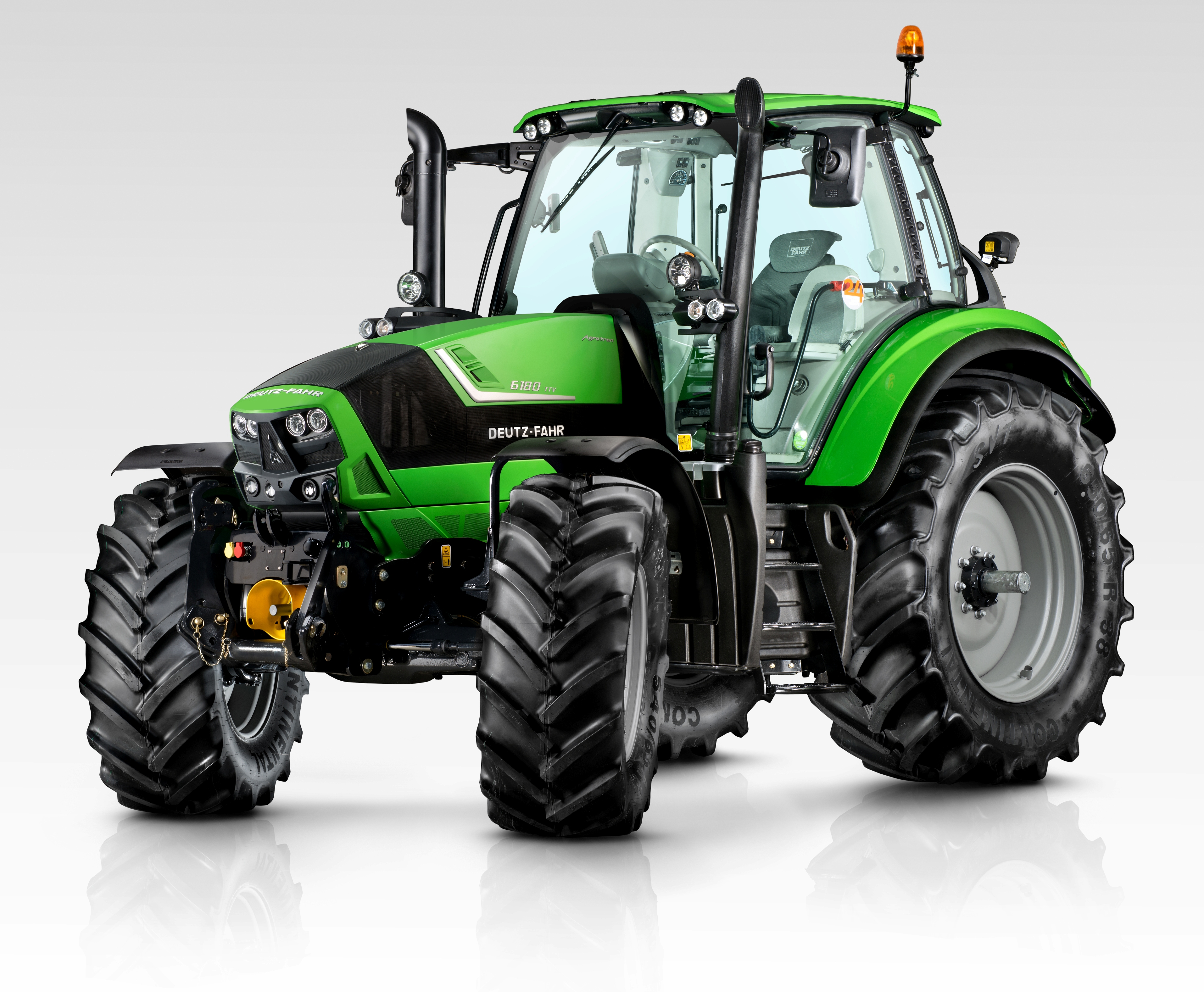 Deutz-Fahr Serie 6 TTV